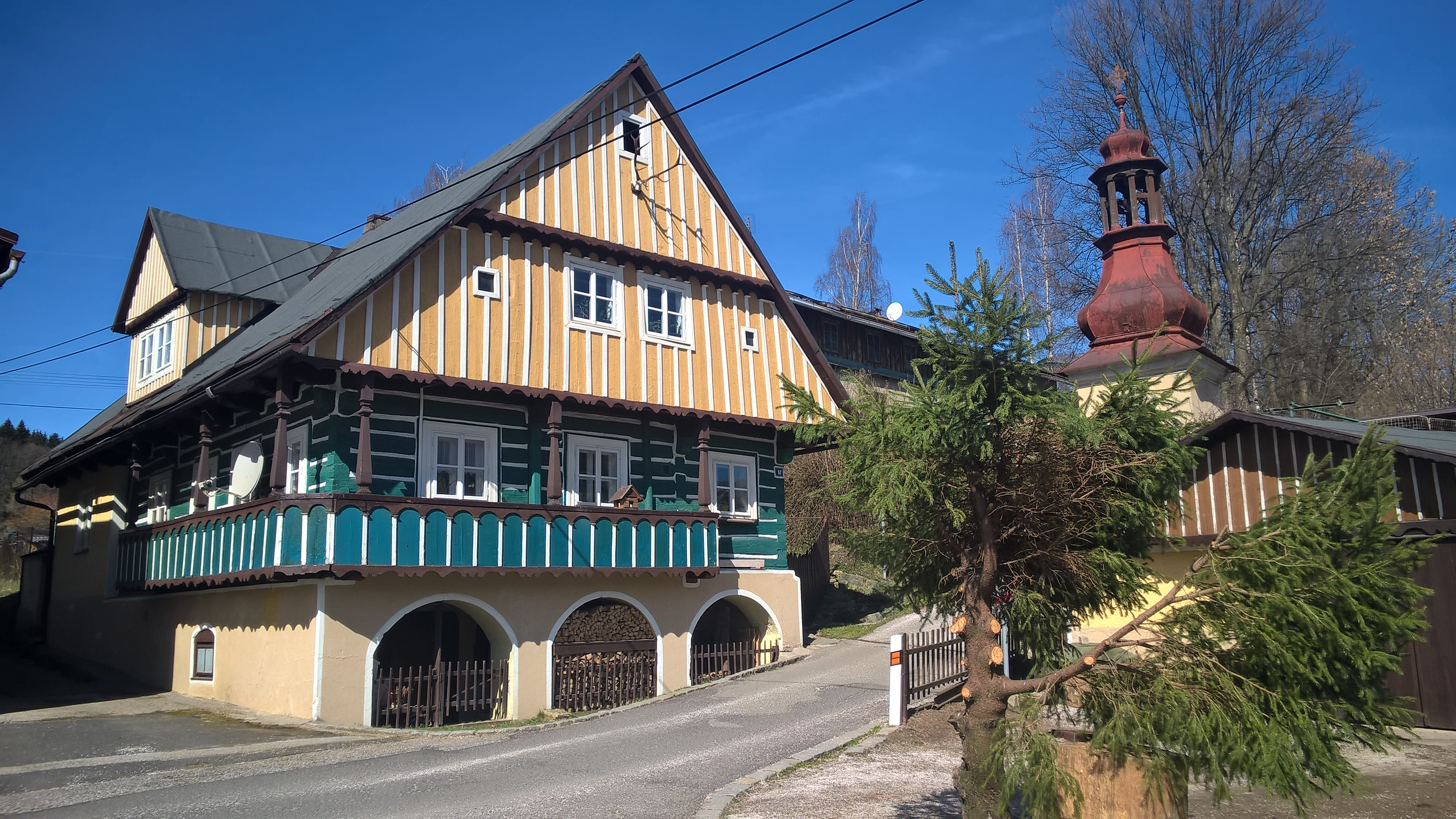 Kovárna, Bucharova 57, Hořejší Vrchlabí, Vrchlabí.